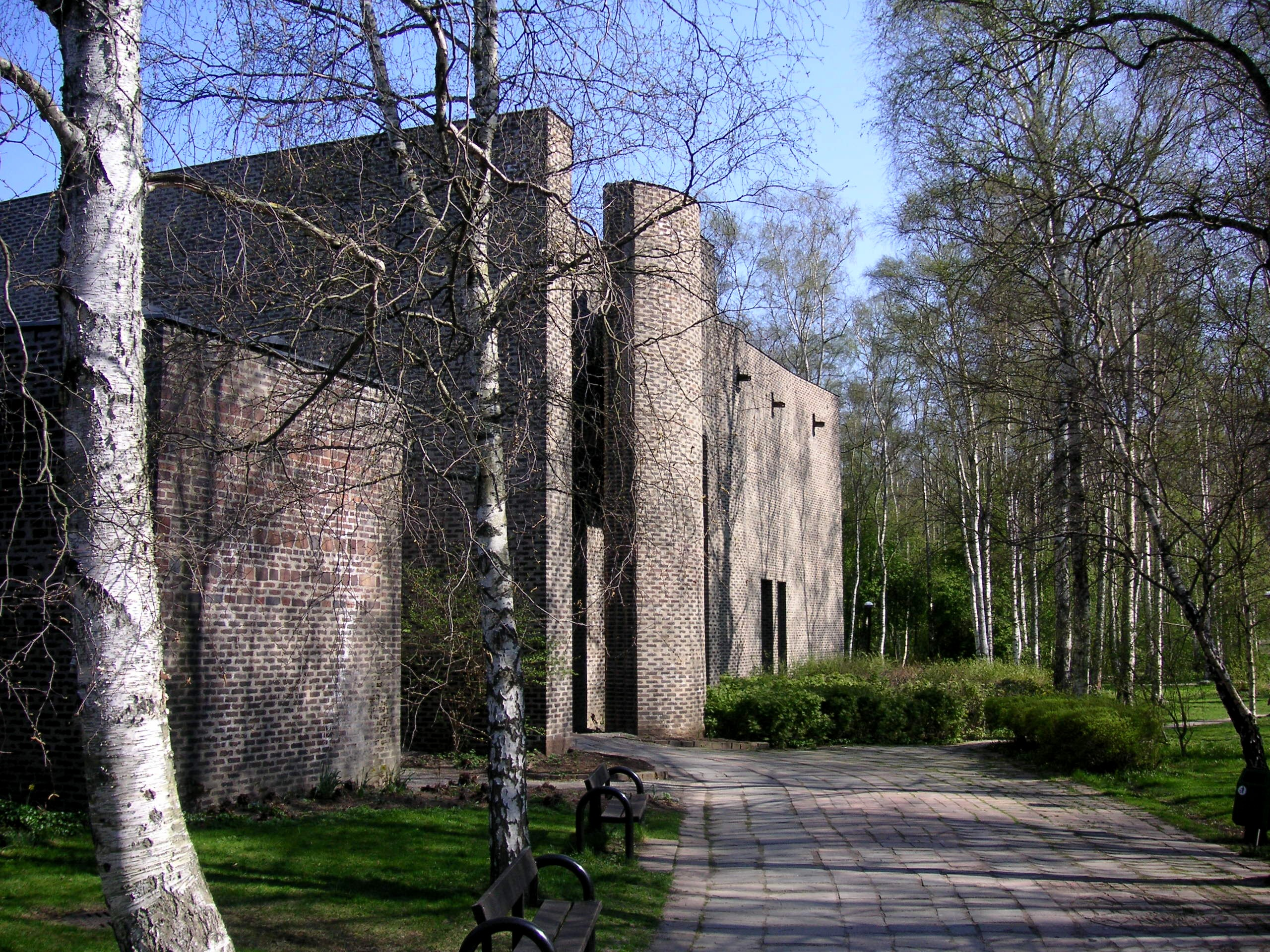 Markuskyrkan i Björkhagen, Stockholm